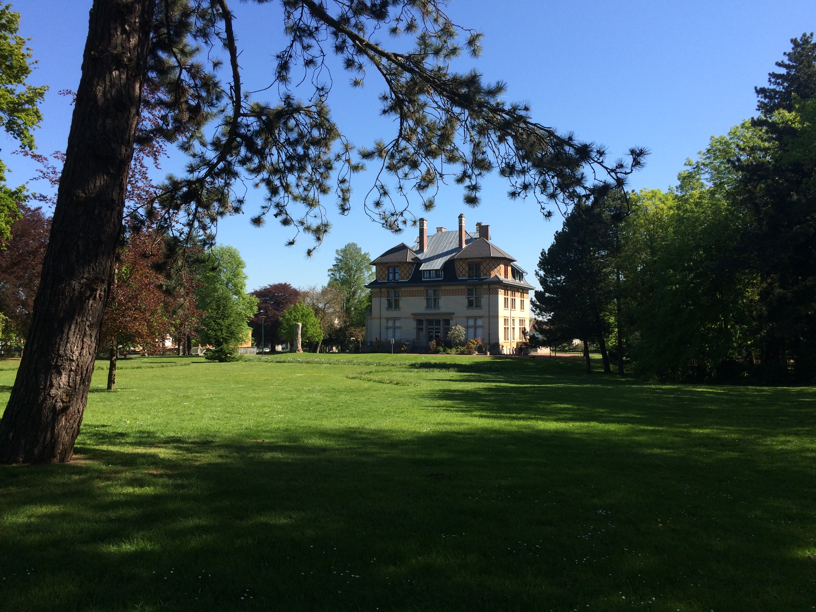 Façade de l'école de musique depuis le parc